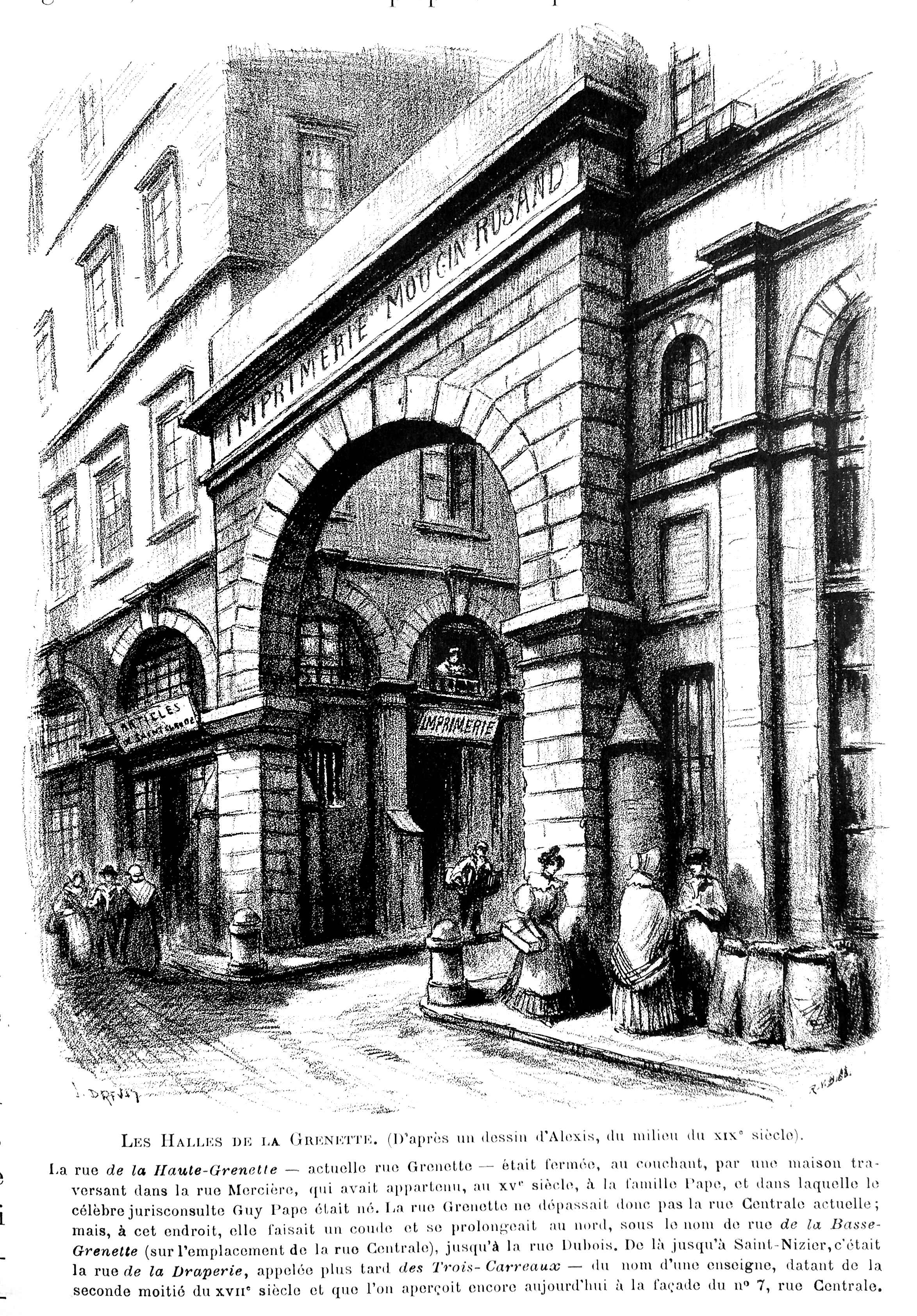 Livre Le Lyon de nos pères, Vingtrinier et Drevet, 1901, page 177, Rougeron-Vignerot-Demoulin et Joannès Drevet : les halles de la Grenette. (D'après un dessin d'Alexix, du milieu du XIXe siècle). Bibliothèque municipale de Lyon.